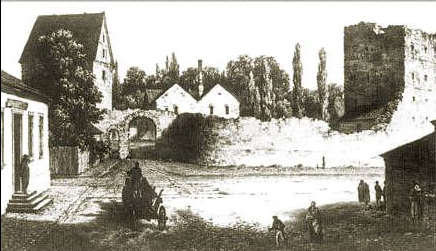 Ruiny zamku łęczyckiego na litografii Napoleona Ordy, Album Widoków, Seria 7, 1881